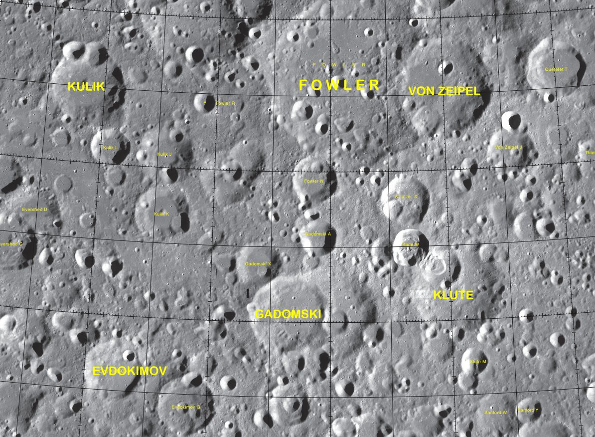 Cráter lunar Evdokimov. Localización. (Imagen LROC)